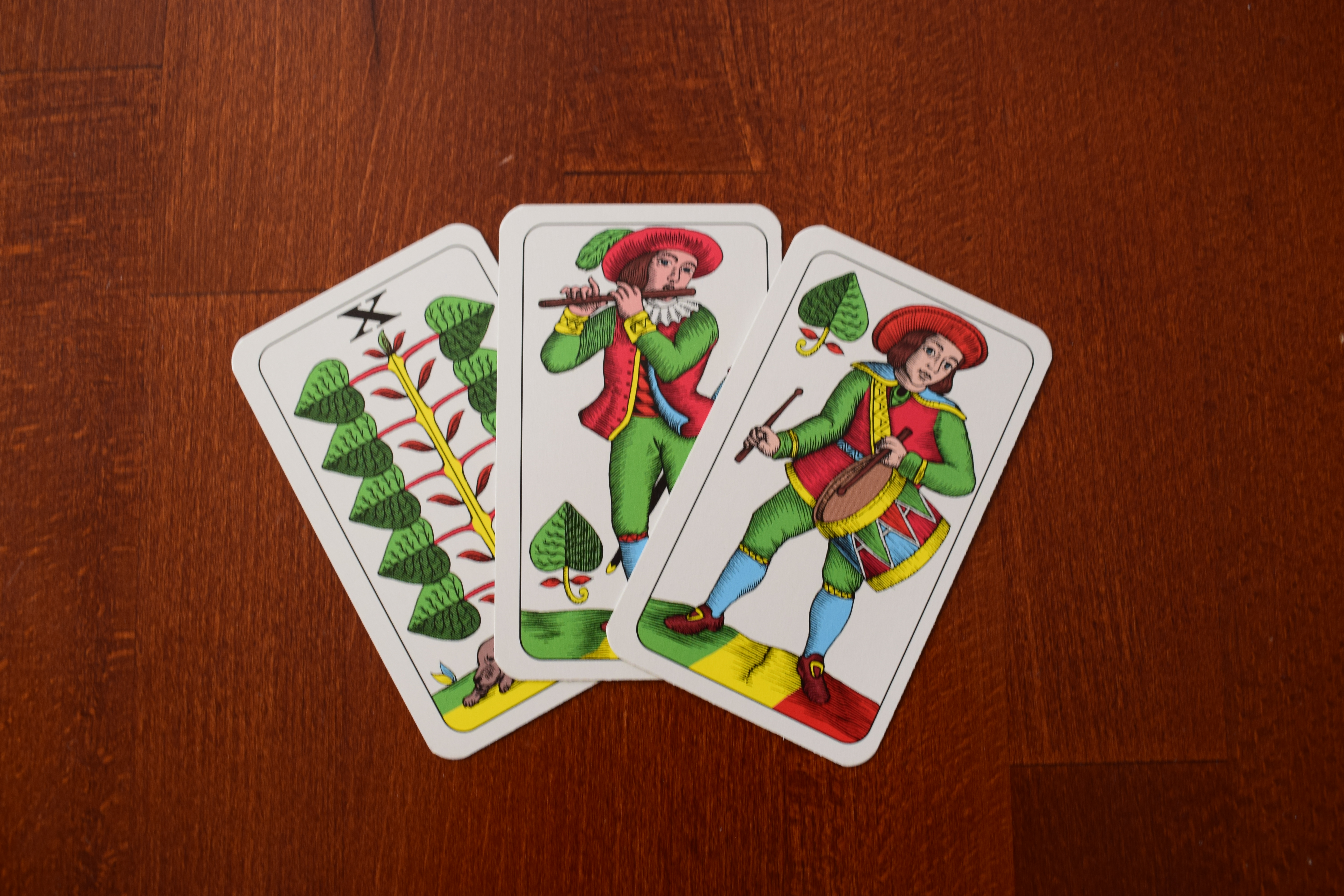 darda cenzr